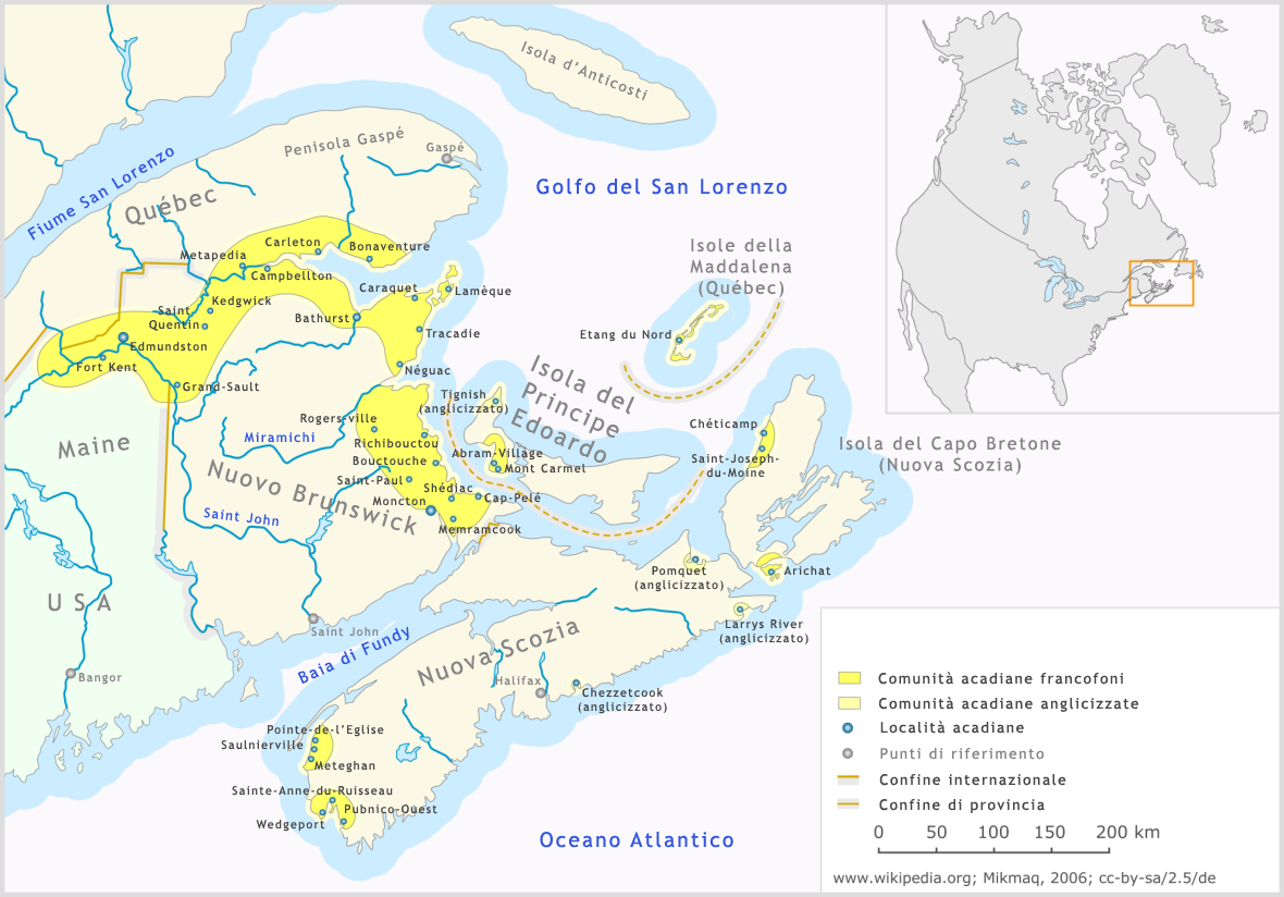 Comunità acadiane